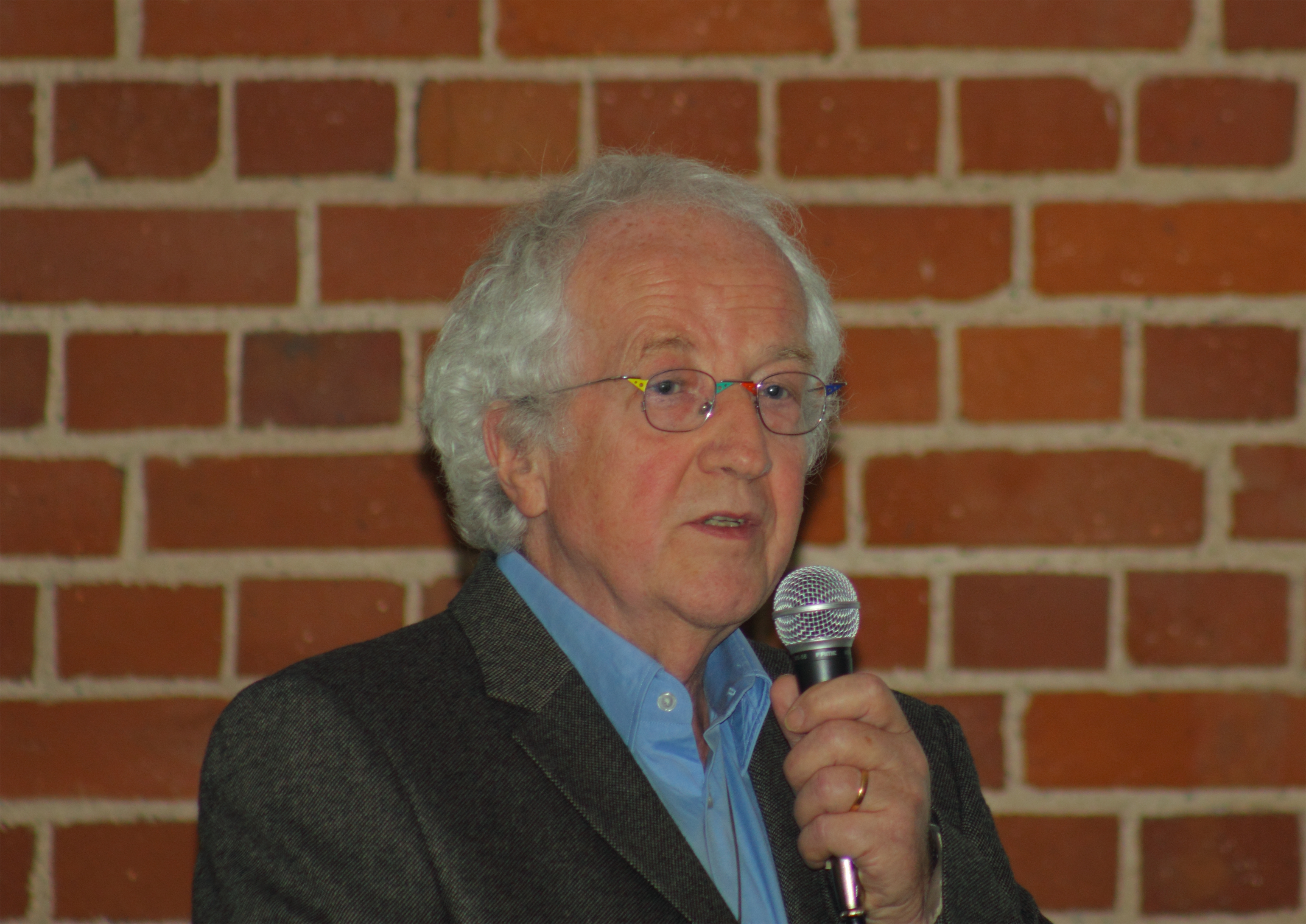 Prof. Gynter Mödder trägt im Rahmen des Kölner «Schilddrüsentags» vor.